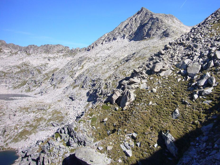 Pic d'Abeller vist des de la Serra Plana; la Vall de Boí, Alta Ribagorça, Catalunya